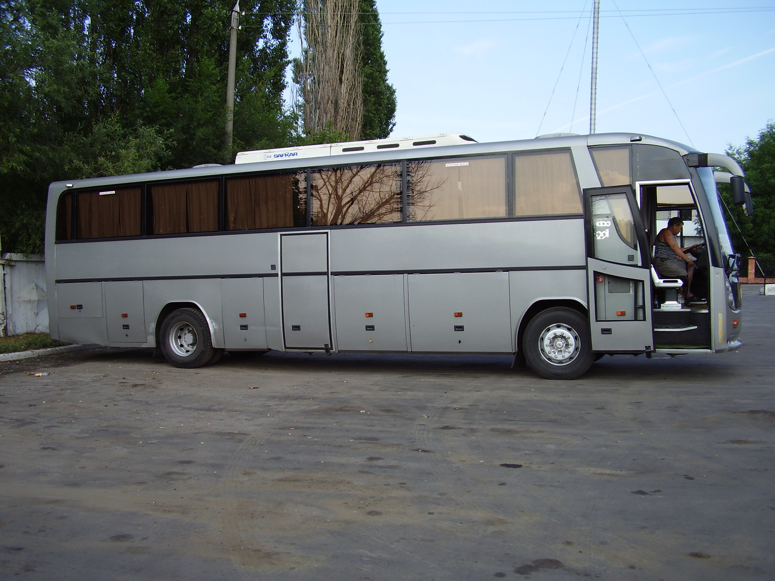 Автобус ГолАЗ-5291 на автовокзале в Воронеже